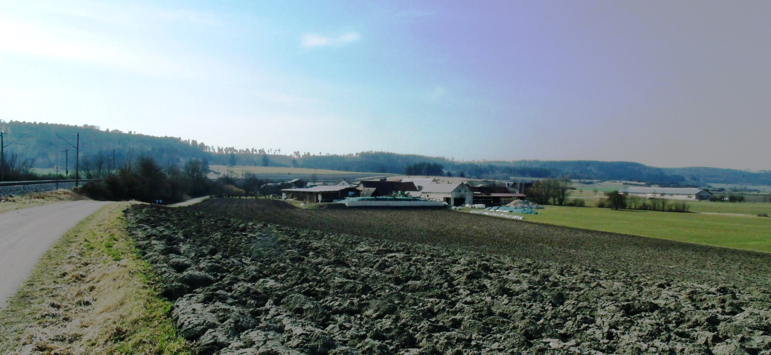 Eichholz, Ortsteil von Leutershausen im mittelfränkischen Landkreis Ansbach